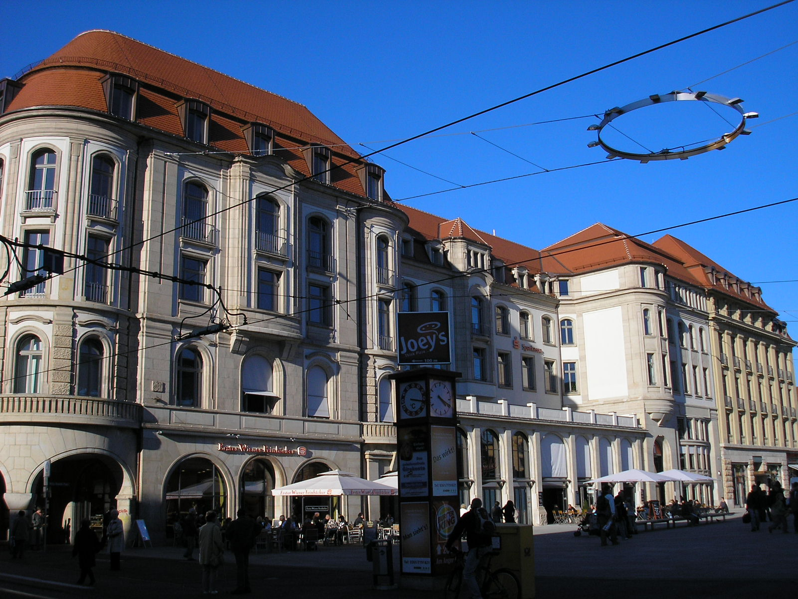 Der Erfurter Hof am Bahnhofsplatz von Erfurt (Thüringen).